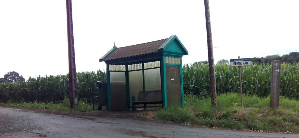 Vista de Remourán, Curtis.